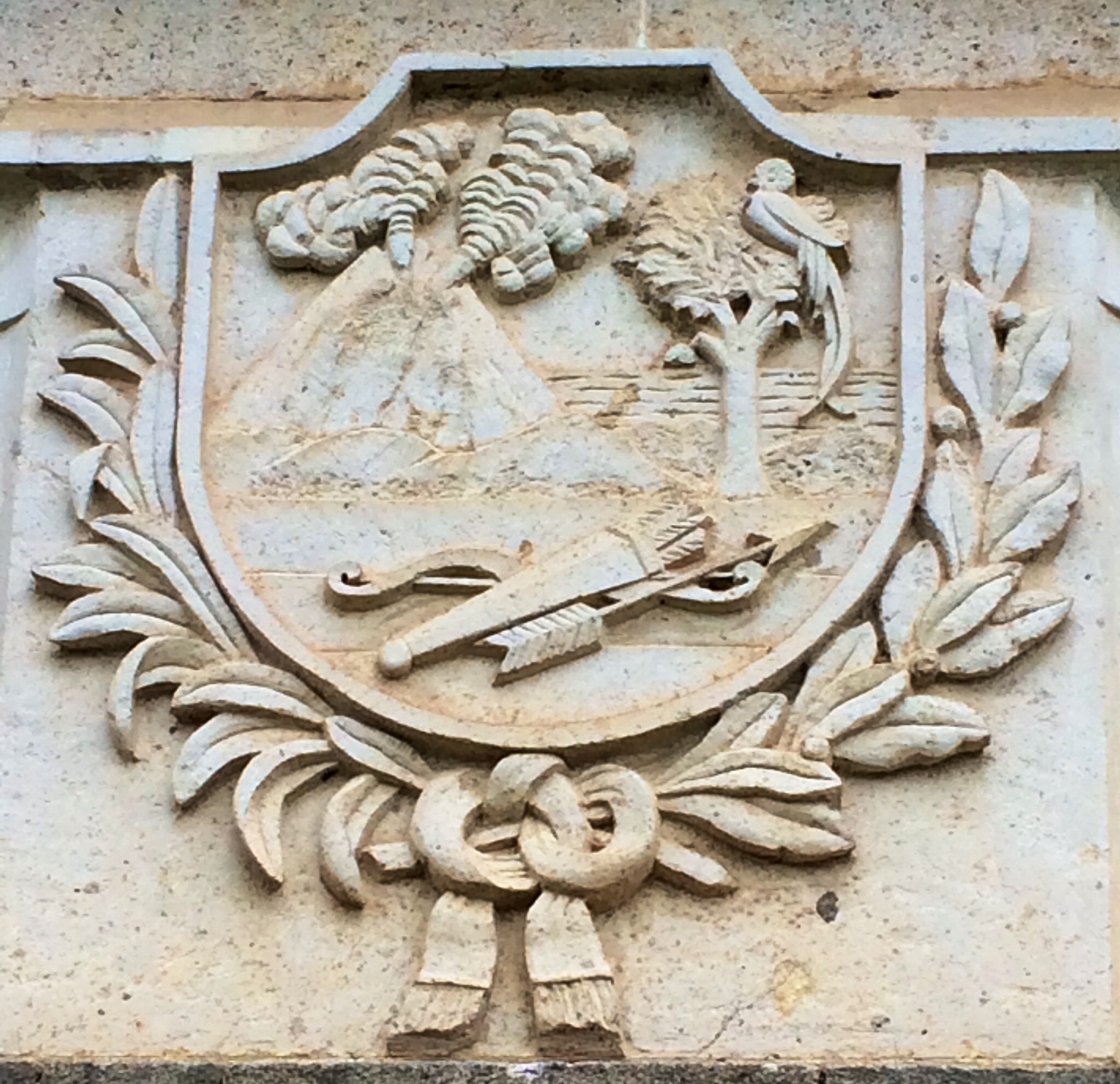 escudoaltos